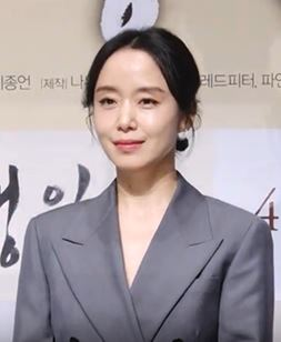 영화 '생일' 제작보고회가 6일 오전 서울 강남구 압구정CGV에서 열렸다